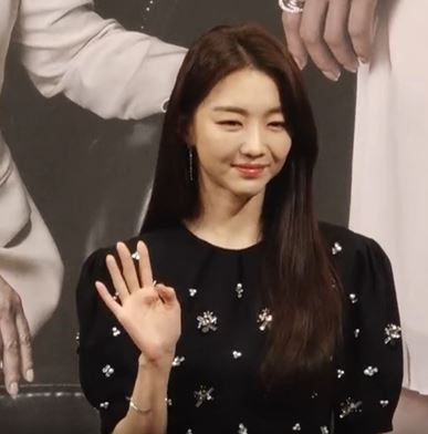 24일 서울 강남구 임피리얼팰리스 호텔에서 진행된 TV CHOSUN(TV조선)의 새 토일드라마 '바벨'의 제작발표회